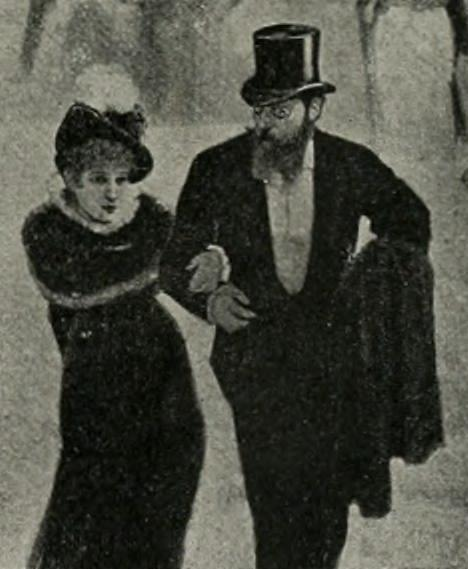 Sarah Bernhardt et Henry Fouquier. Détail d'une série de photographies du panorama le "Tout-Paris" peint par Charles Castellani et présenté lors de l'exposition universelle de 1889.